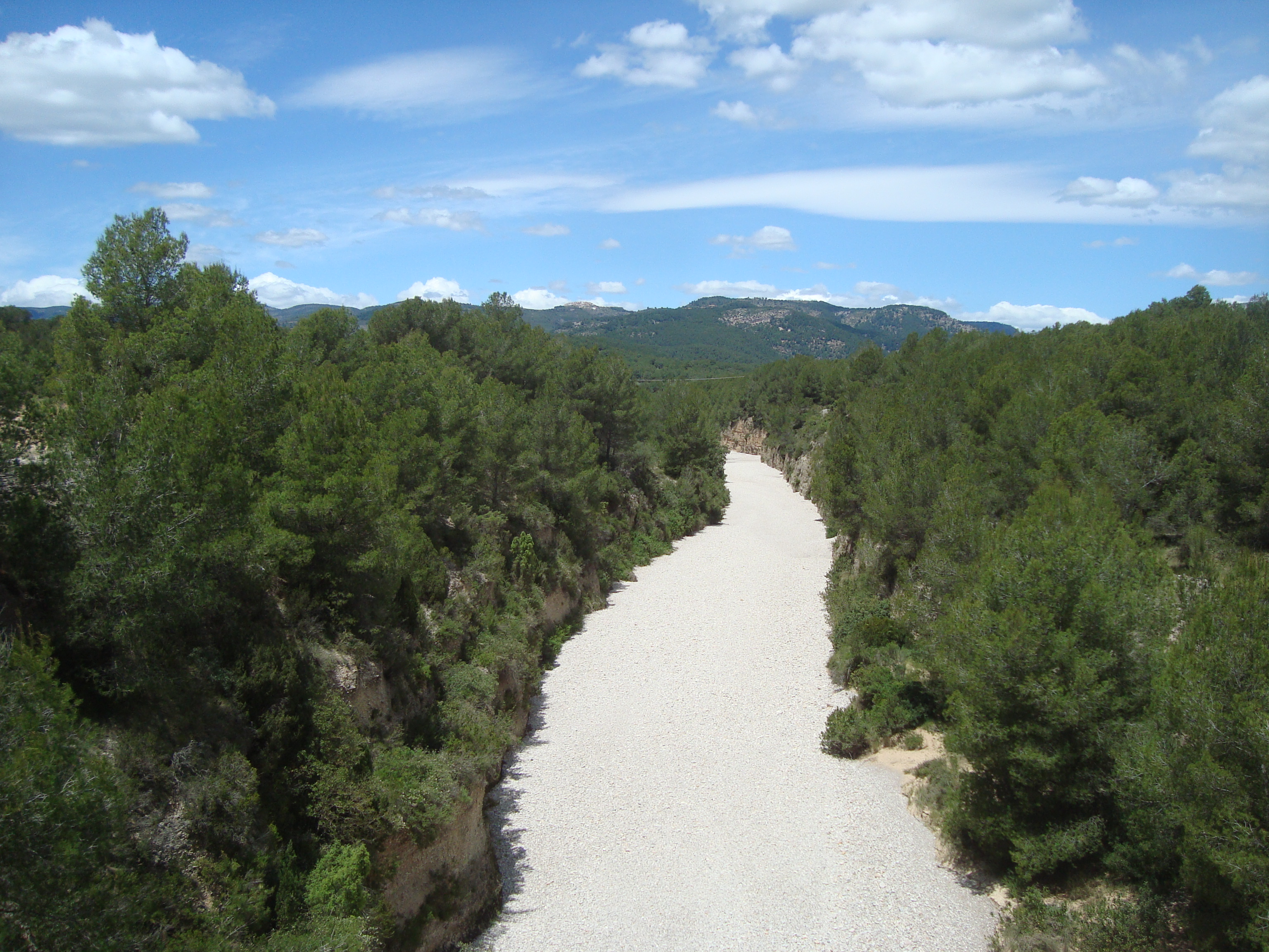 El Riu Montlleó al seu pas delimitan els termes de Benafigos i Atzaneta del Maestrat